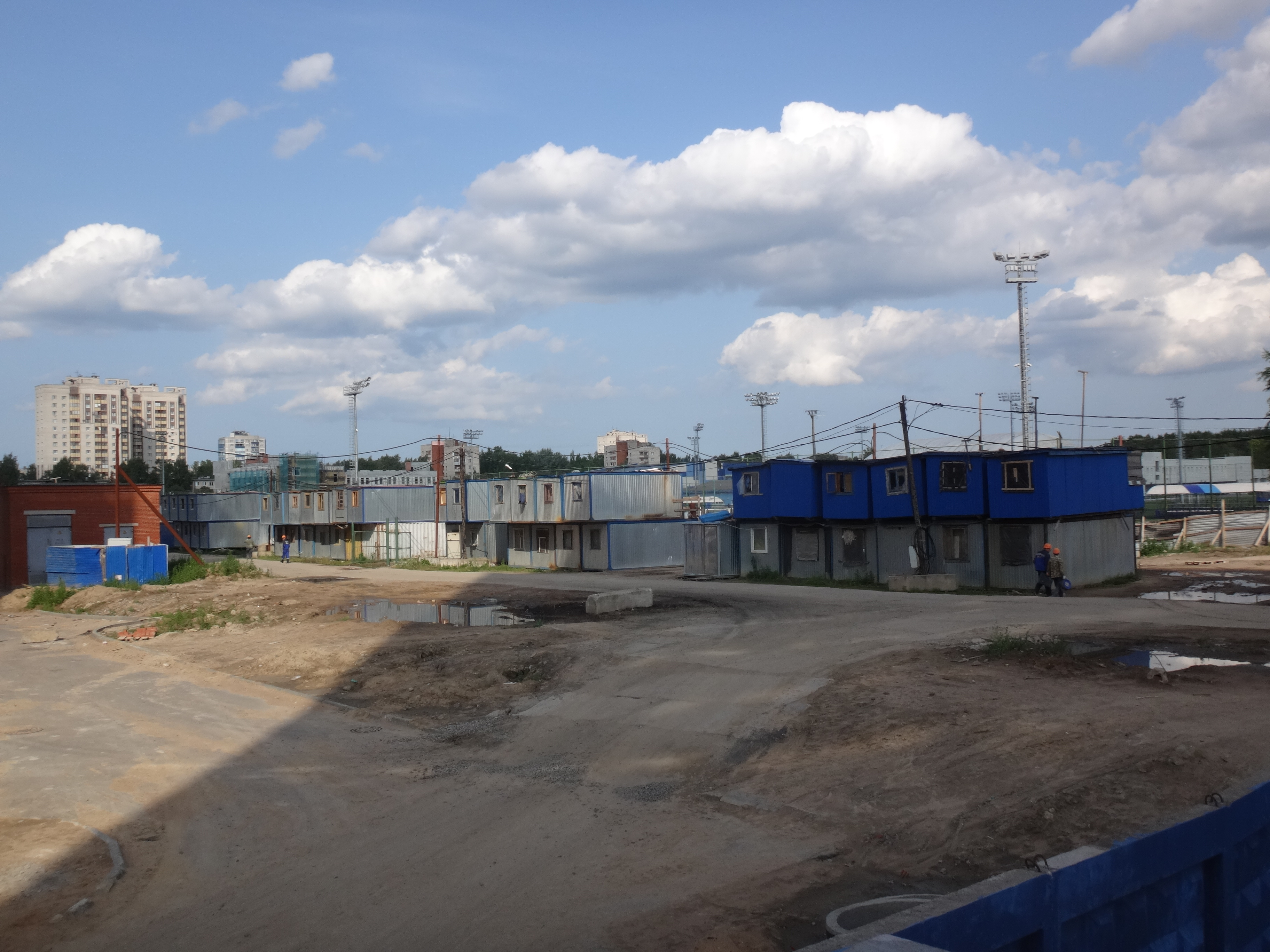 Ряды бытовок для работников стройки